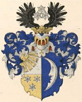 Schillingi (Kaliküla) suguvõsa aadlivapp